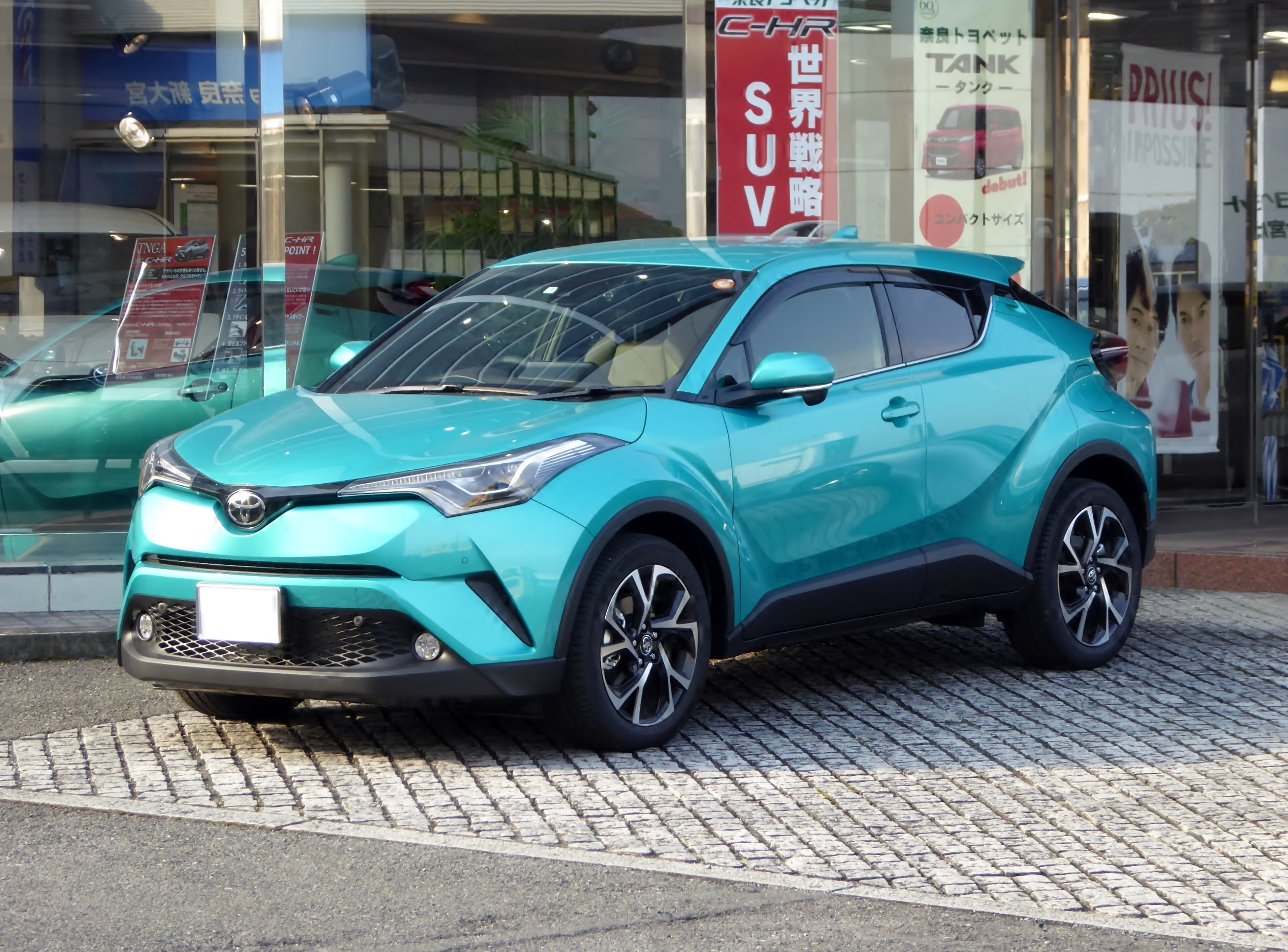 DBA-NGX50-AHXEX型トヨタ・C-HR G-Tをフロントから撮影。